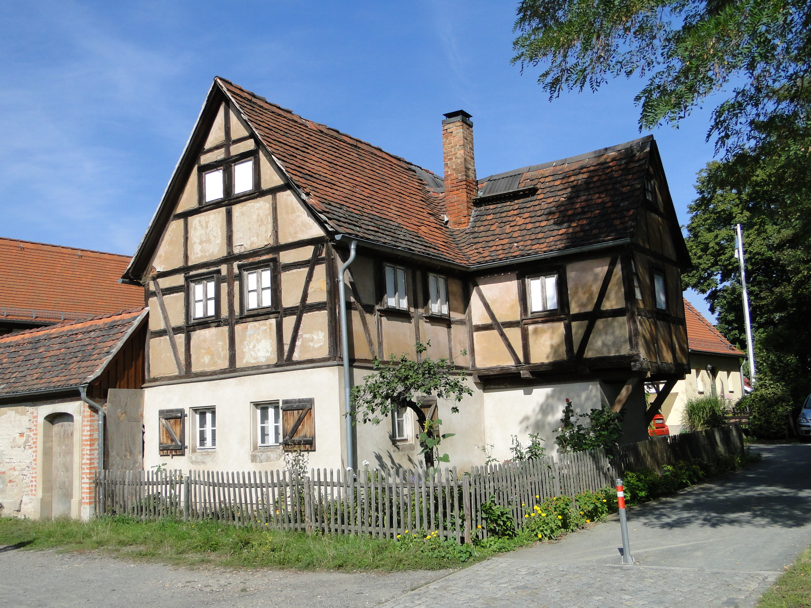 Kulturdenkmal Altdobritz 15 Dresden